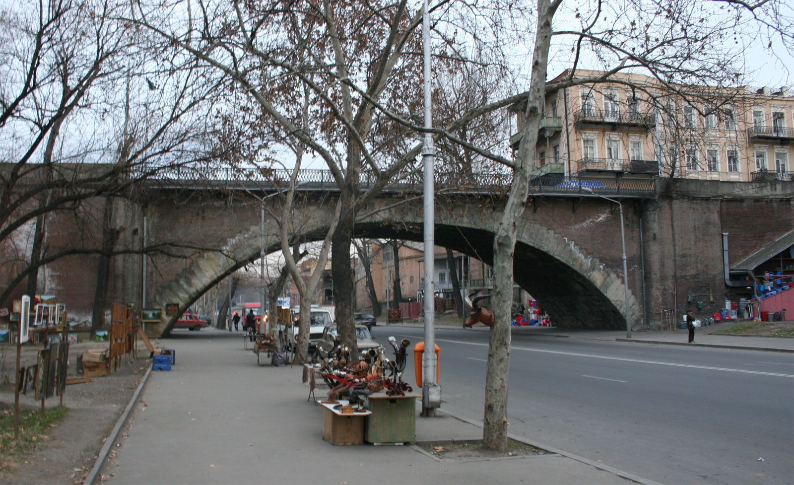 მშრალი ხიდი, იანვარი, 2007. ფოტო: ალსანდრო.